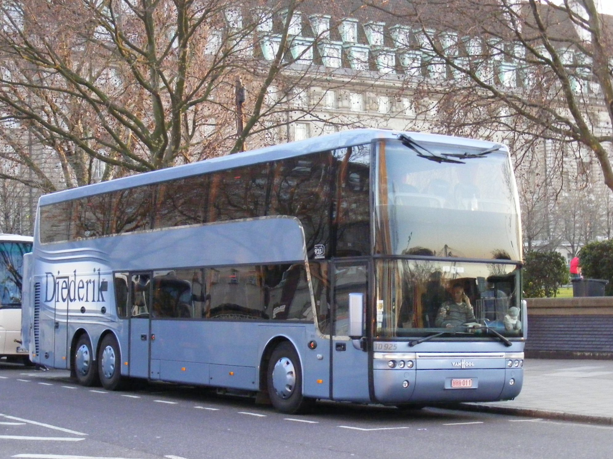 Fleet details of Diederik Reizen, Assenede here.